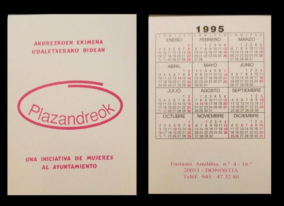 Plazandreok alderdi politikoa Donostiako Udal Hauteskundeetara aurkeztu izanen alderdi feminista da.